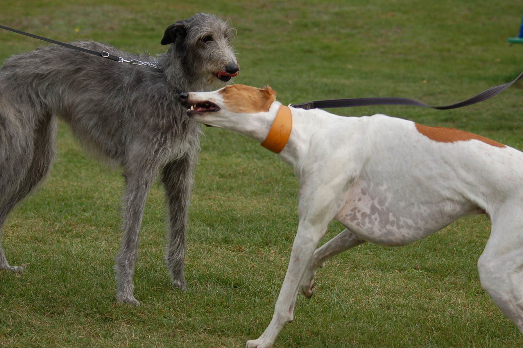 Wilczarz & hart